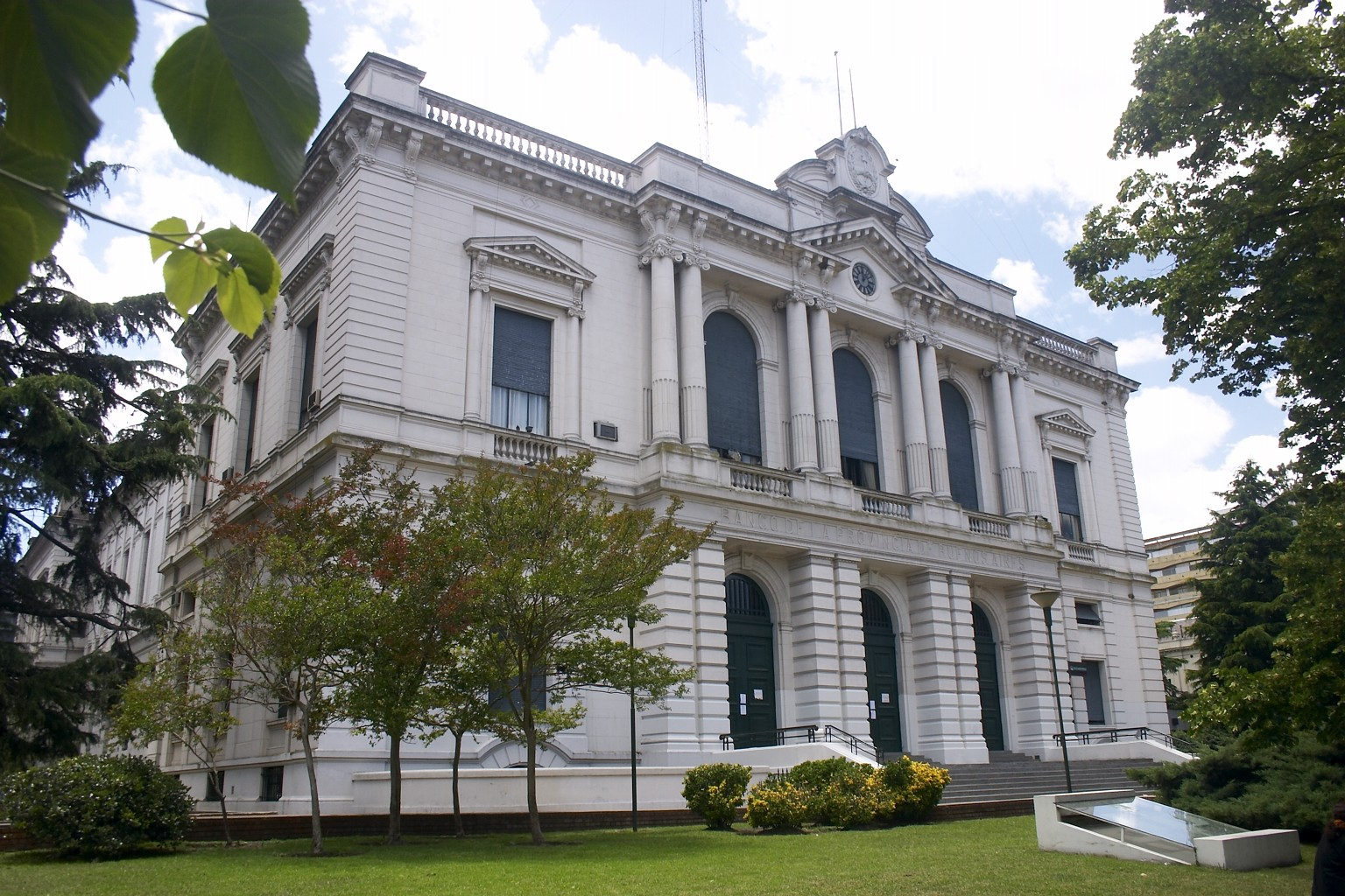 Casa Matriz del Banco de la Provincia de Buenos Aires, en La Plata, Argentina